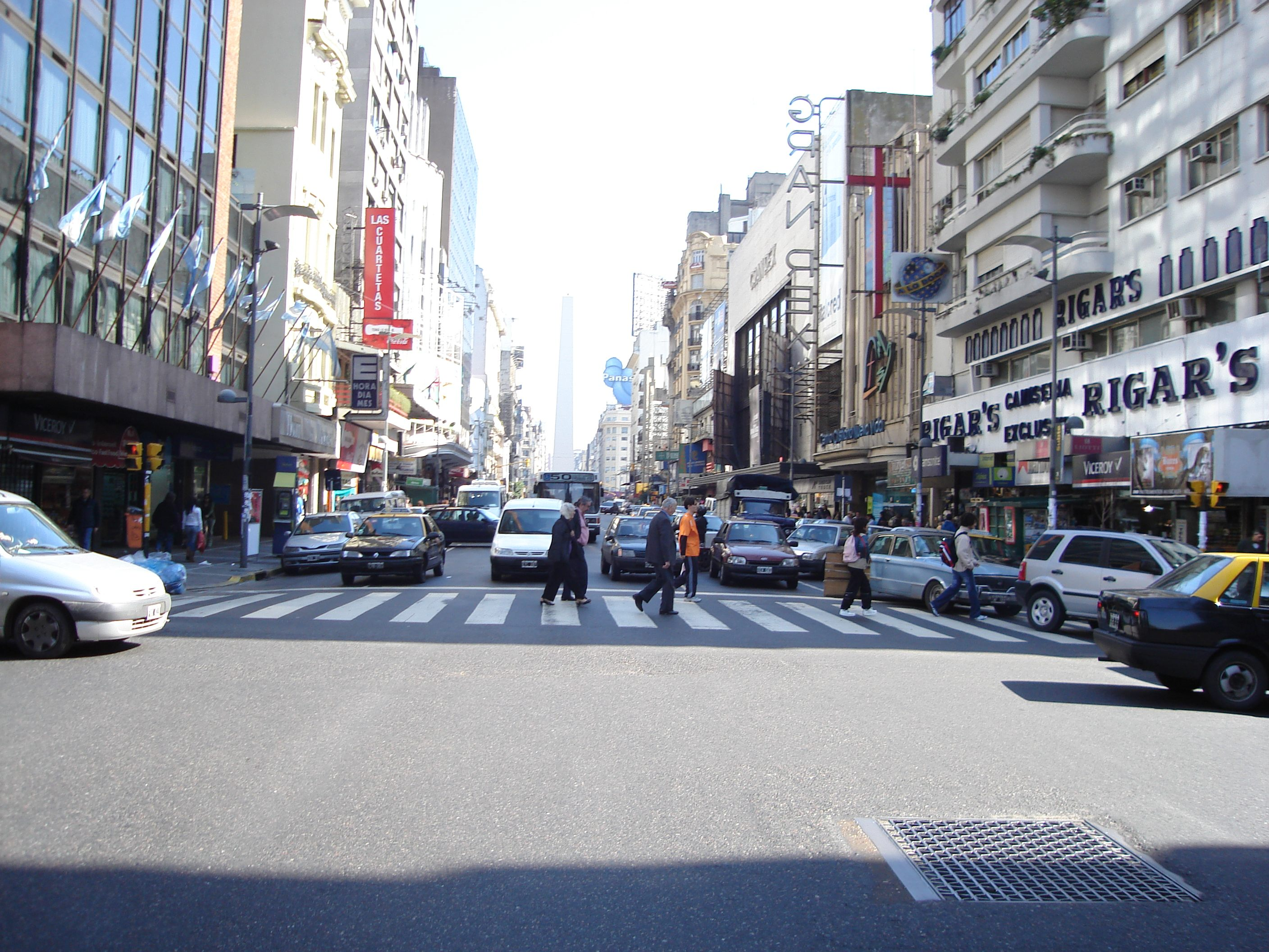 La Avenida Corrientes a metros del Obelisco, en su intersección con la calle Esmeralda. Zona de teatros.